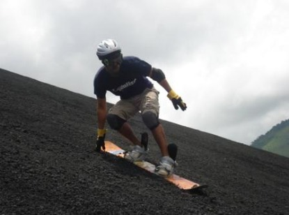 Sandboarding Cerro Negro